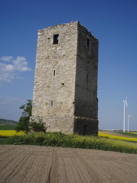 Pohanská veža pri Kittsee